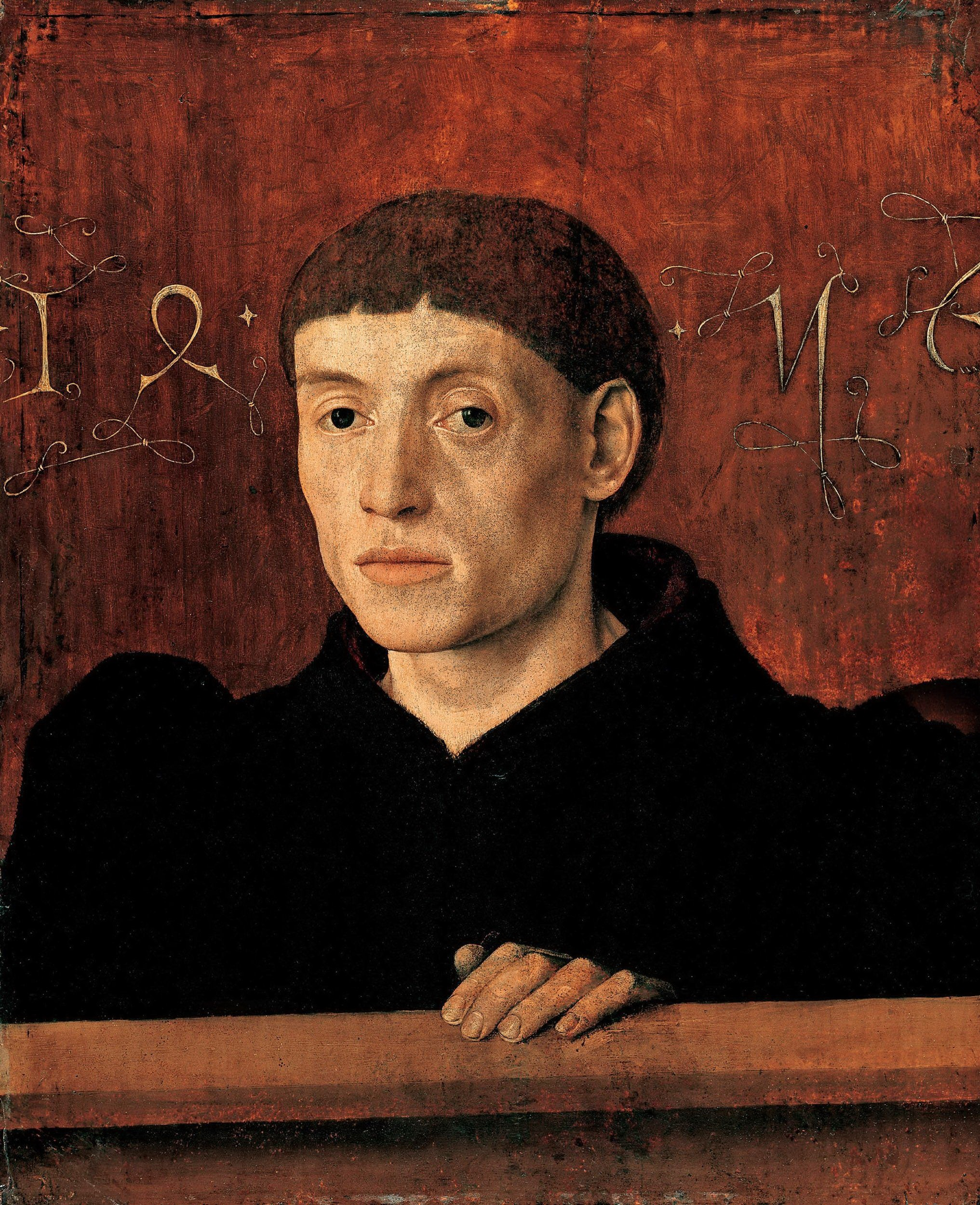 Brustbild eines Mannes